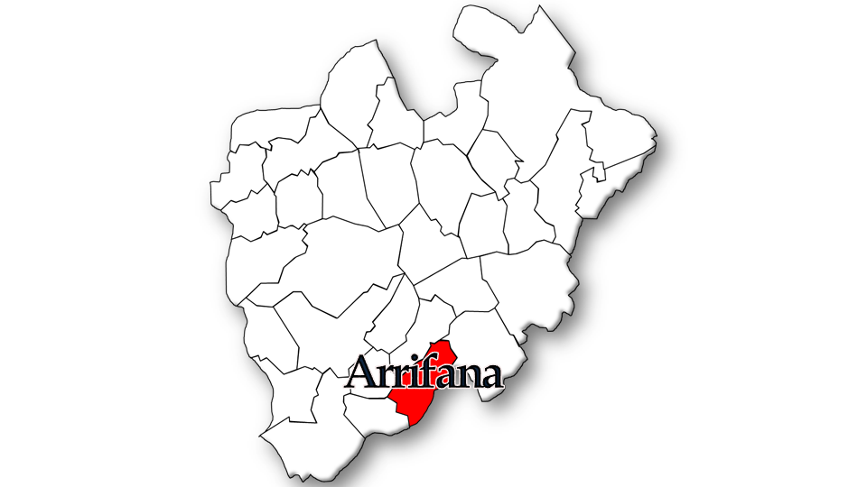 Variação da População 1864 / 2011